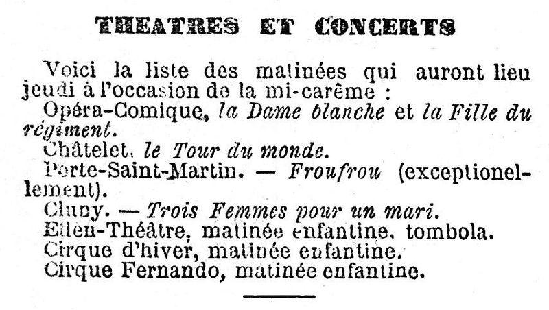 Programmation de salles de spectacles parisiennes pour le jeudi de la Mi-Carême 1884 - Journal des débats - Mercredi 19 mars 1884 - Page 4, 1ère colonne